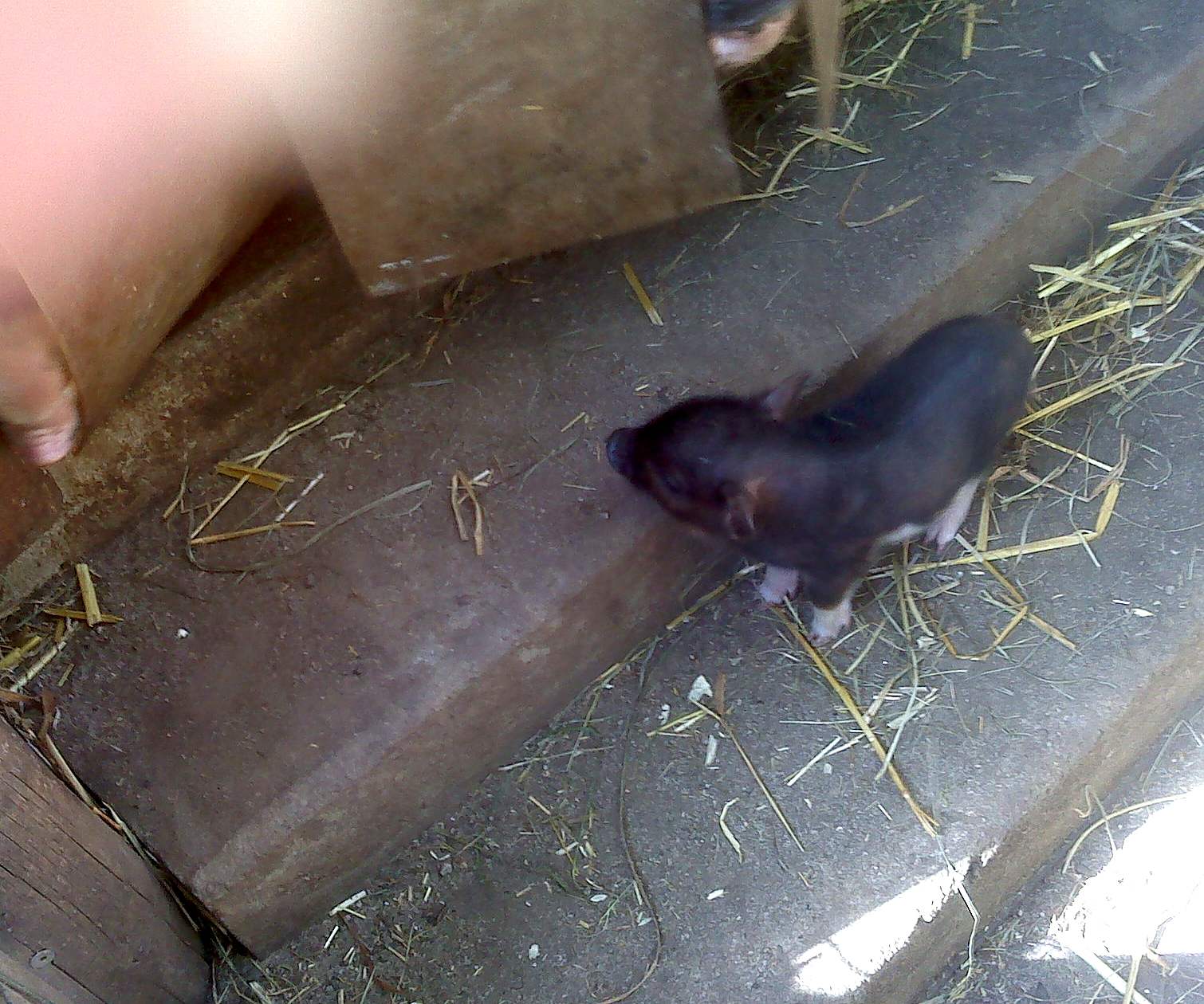 Tiergarten Aue, einige Tage altes Ferkel von einem gezüchteten Mini-Hausschwein (Scrofa f. domestica)